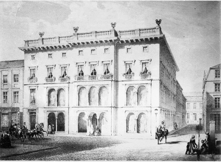 Ansicht des Kaufhauses Gerson in Berlin, um 1850.